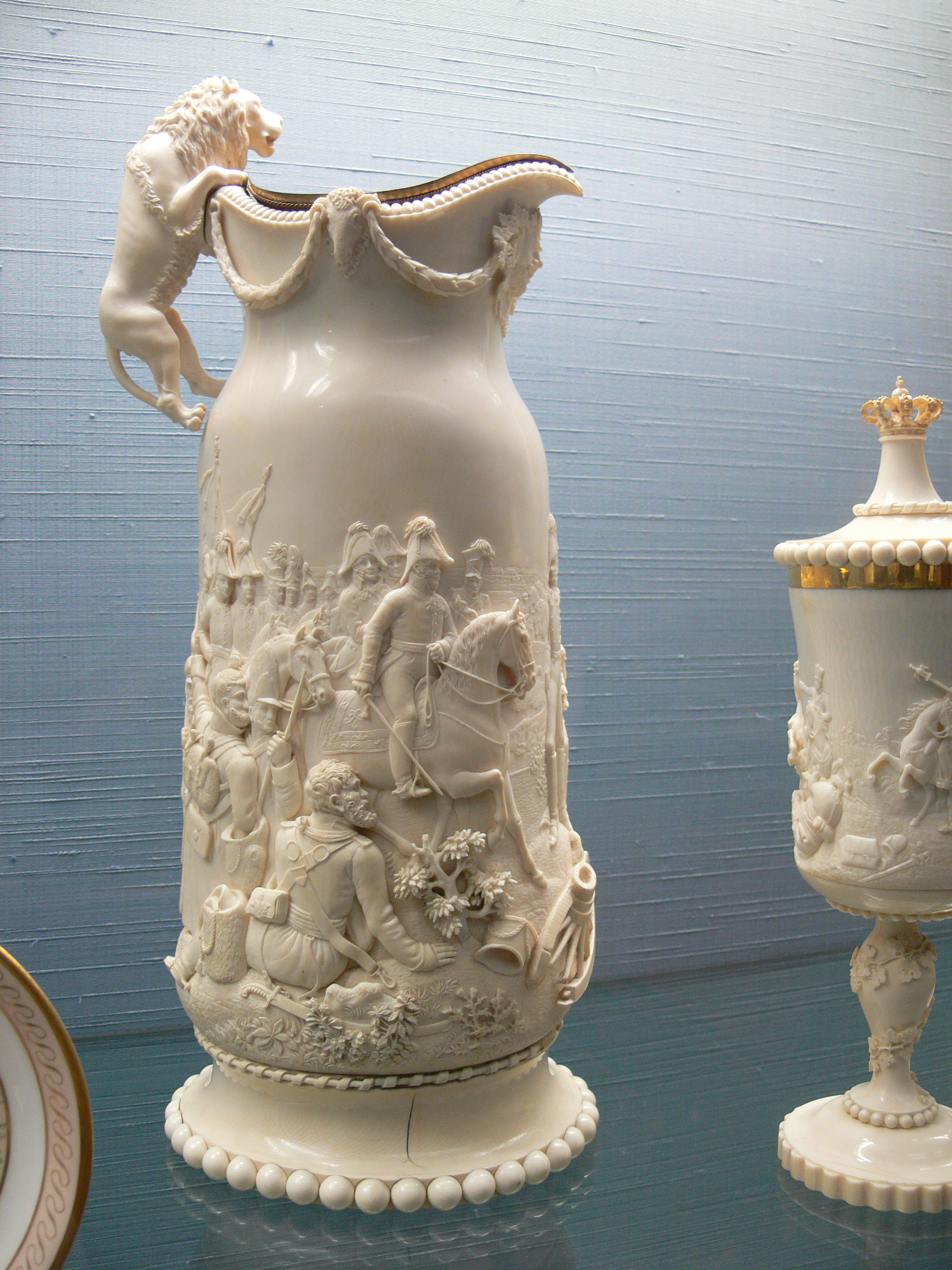 Prunkkanne und zwei Pokale mit Szenen aus den Befreiungskriegen, Kanne: Fürst Schwarzenberg bringt den verbündeten Monarchen die Nachricht vom Sieg über Napoleon bei Leipzig am 19. Oktober 1813; Pokale mit Schlachten; Elfenbein (mit silbervergoldetem Einsatz); von Leberecht Wilhelm Schulz, Meiningen 1842 Kunstgewerbemuseum Berlin, Inv. Nr. Hz 1294 und Hz 1295 (Kanne und Pokale)